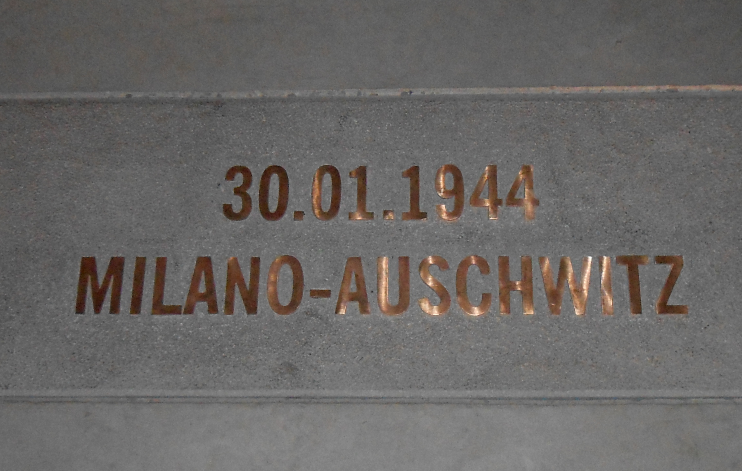 Targa "a pavimento" del memoriale a ricordo di uno dei viaggi dei deportati dal binario 21 dalla Stazione Centrale di Milano